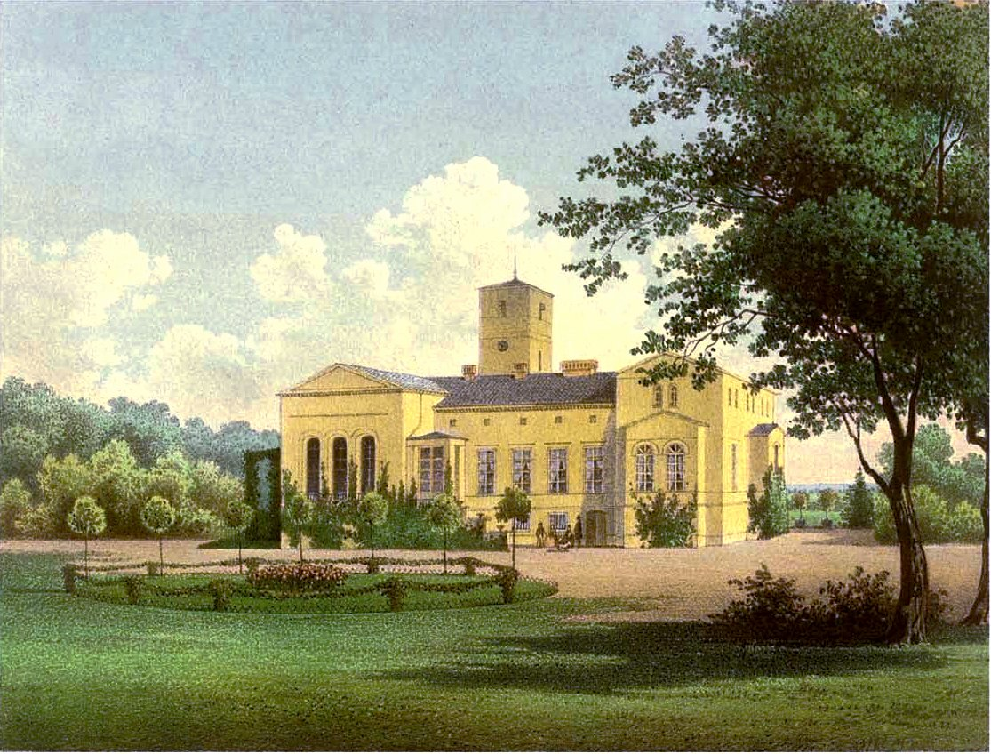 Herrensitz in Glietz, Kreis Lübben, Südfassade, Lithographie 1865/66, Duncker, dort Quelle: Hahn, P.-M./Lorenz, H., Herrenhäuser in Brandenburg und der Niederlausitz, Kommentierte Neuausgabe des Ansichtenwerkes von Alexander Duncker. 2000